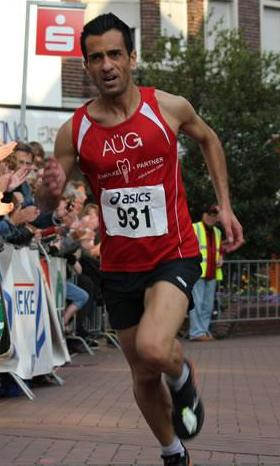 Elias Sansar in action